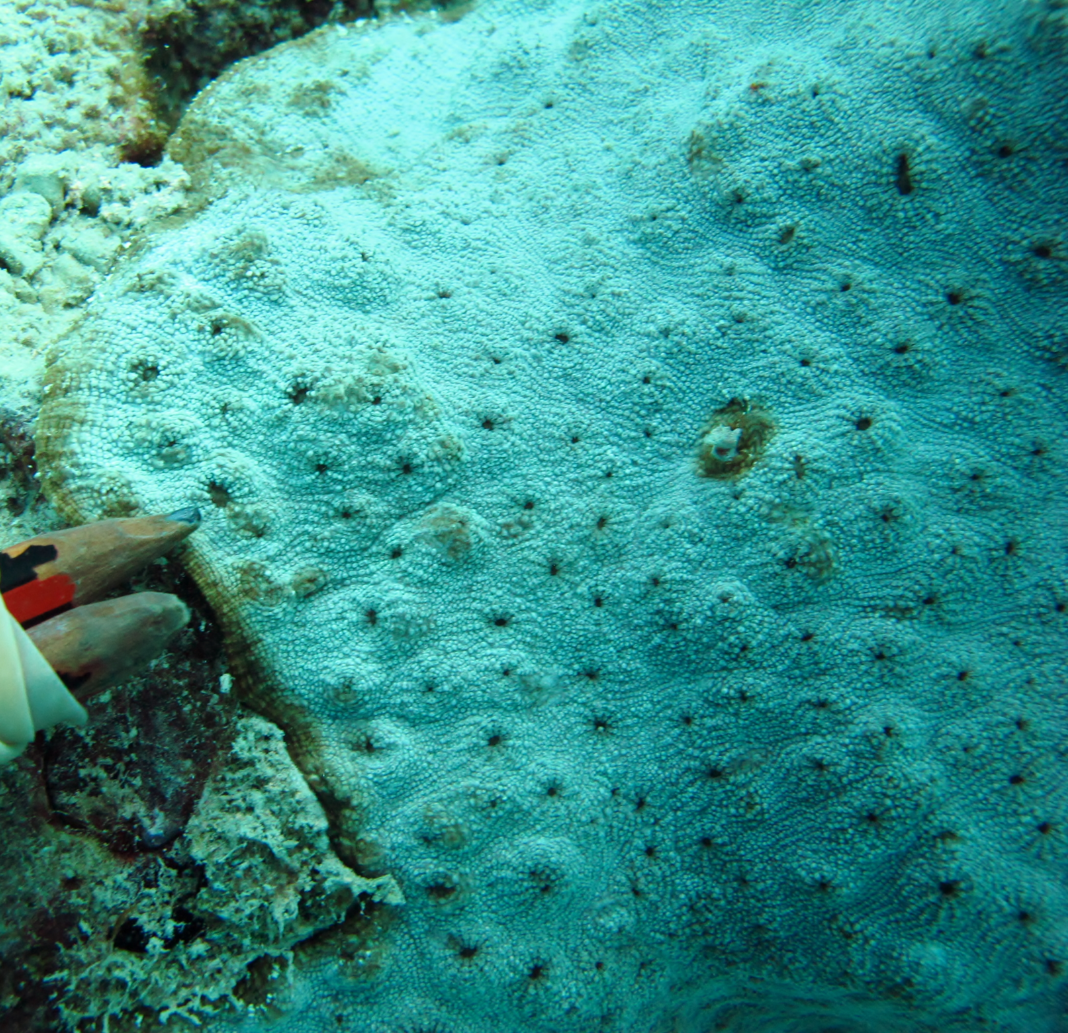 Echinophyllia echinoporoides en la isla Masig, Estrecho de Torres, Australia